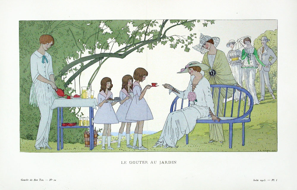 Fashion plate from La Gazette du Bon Ton. Title: "Le Gouter au Jardin"